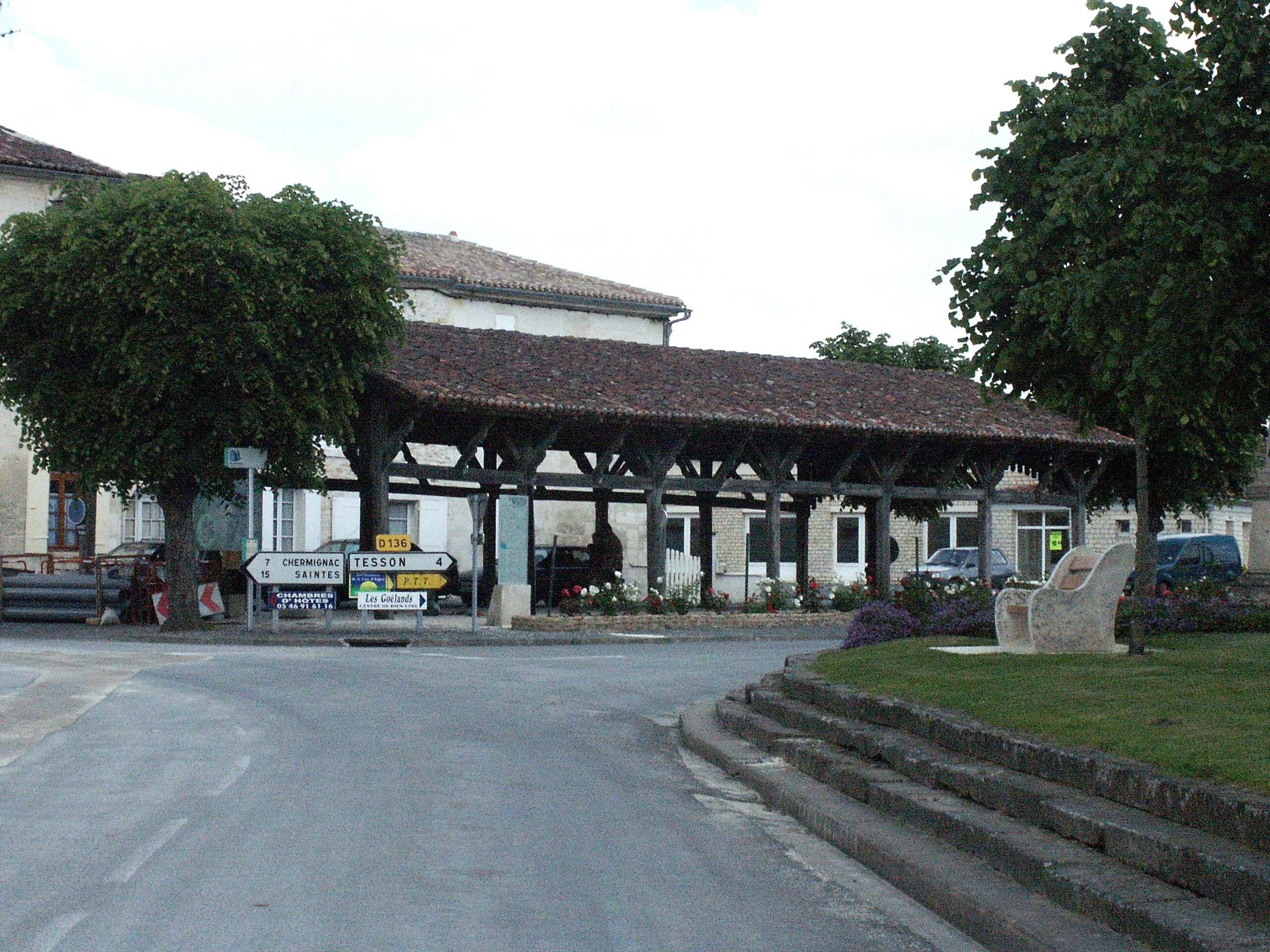 Vieille Halle